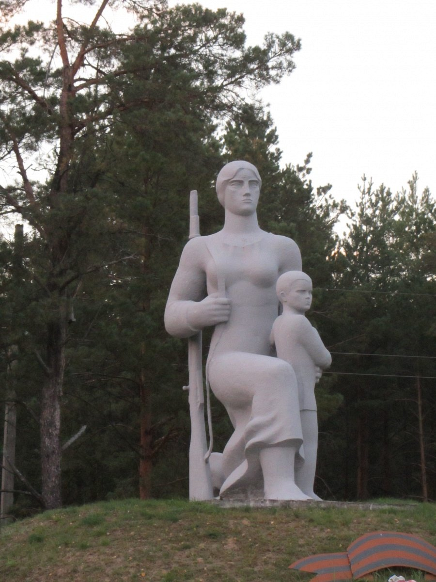 Акцябрскі раён